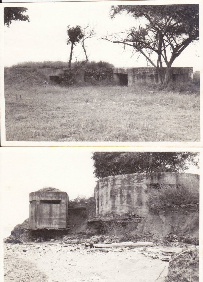 Lautem-casamata dos japoneses-Junho 1970